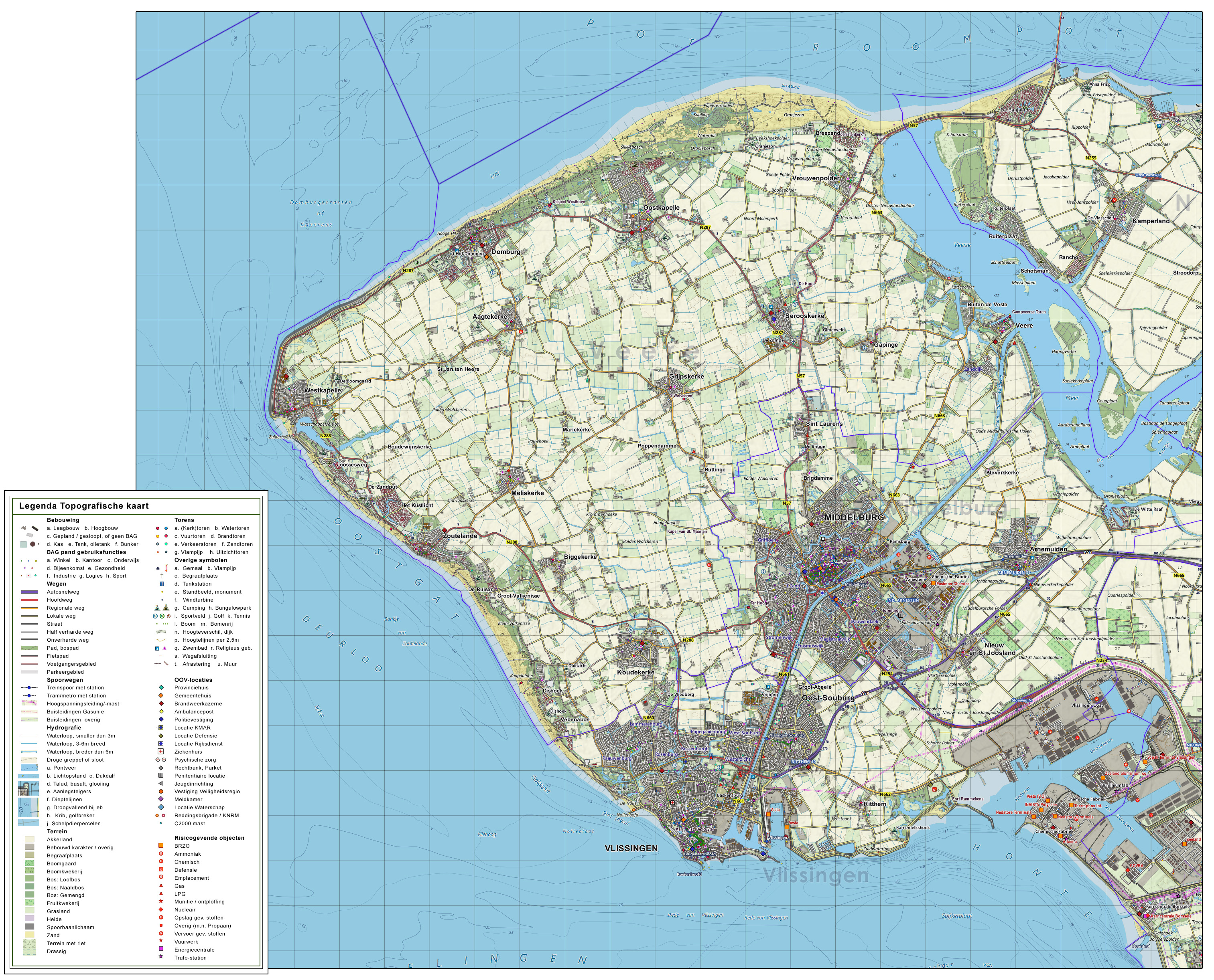 Topografische kaart van Walcheren o.b.v. luchtfoto 2011. Op basis van de GML open geodata van de BRT/Top10NL (basisregistratie Topografie, Kadaster 2011), vrijgegeven door Kadaster onder de Creative Commons BY licentie. Samenstelling en kleurenschema: Jan-Willem van Aalst, met QuantumGIS en Photoshop.